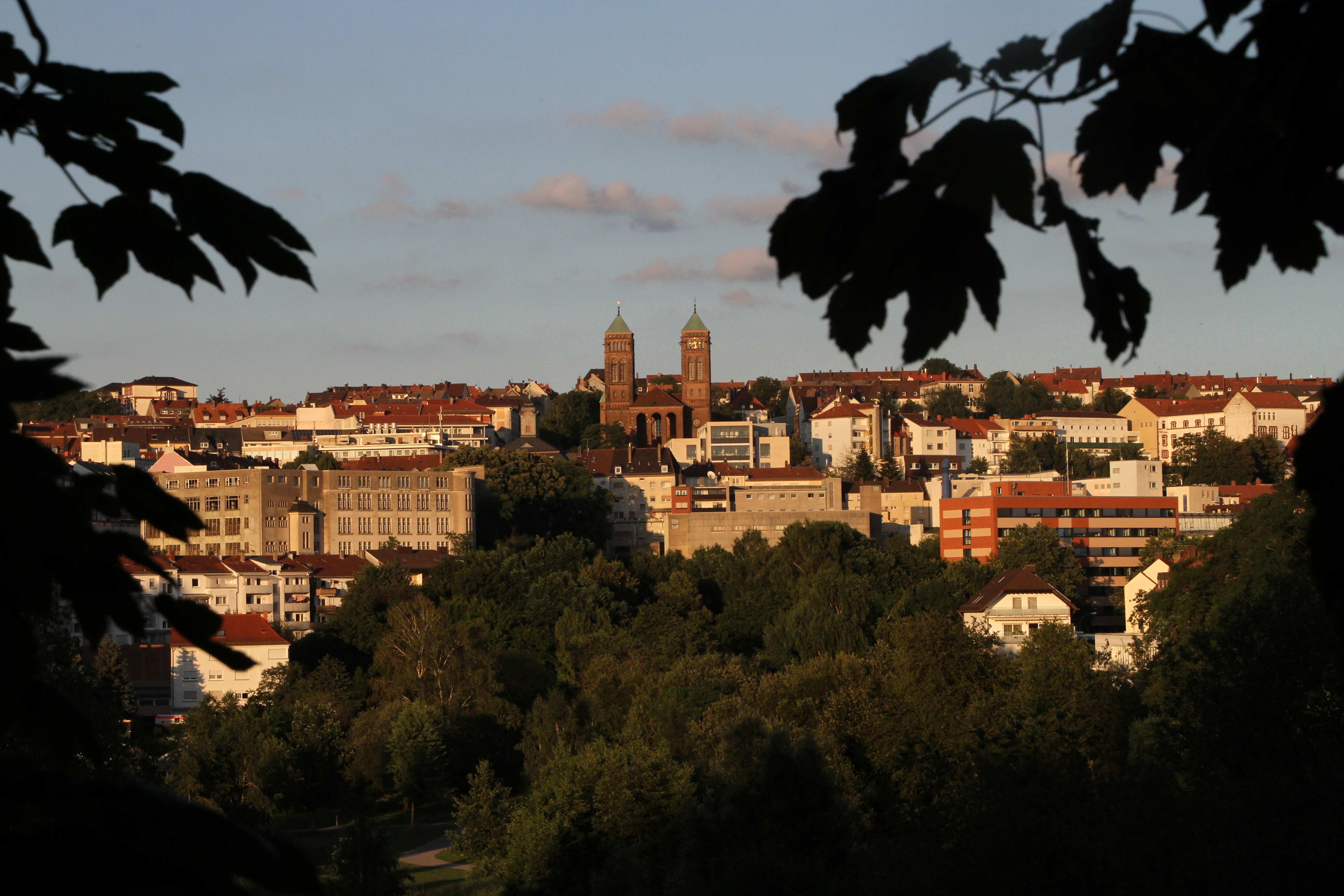 Pirmasens, Panorama.